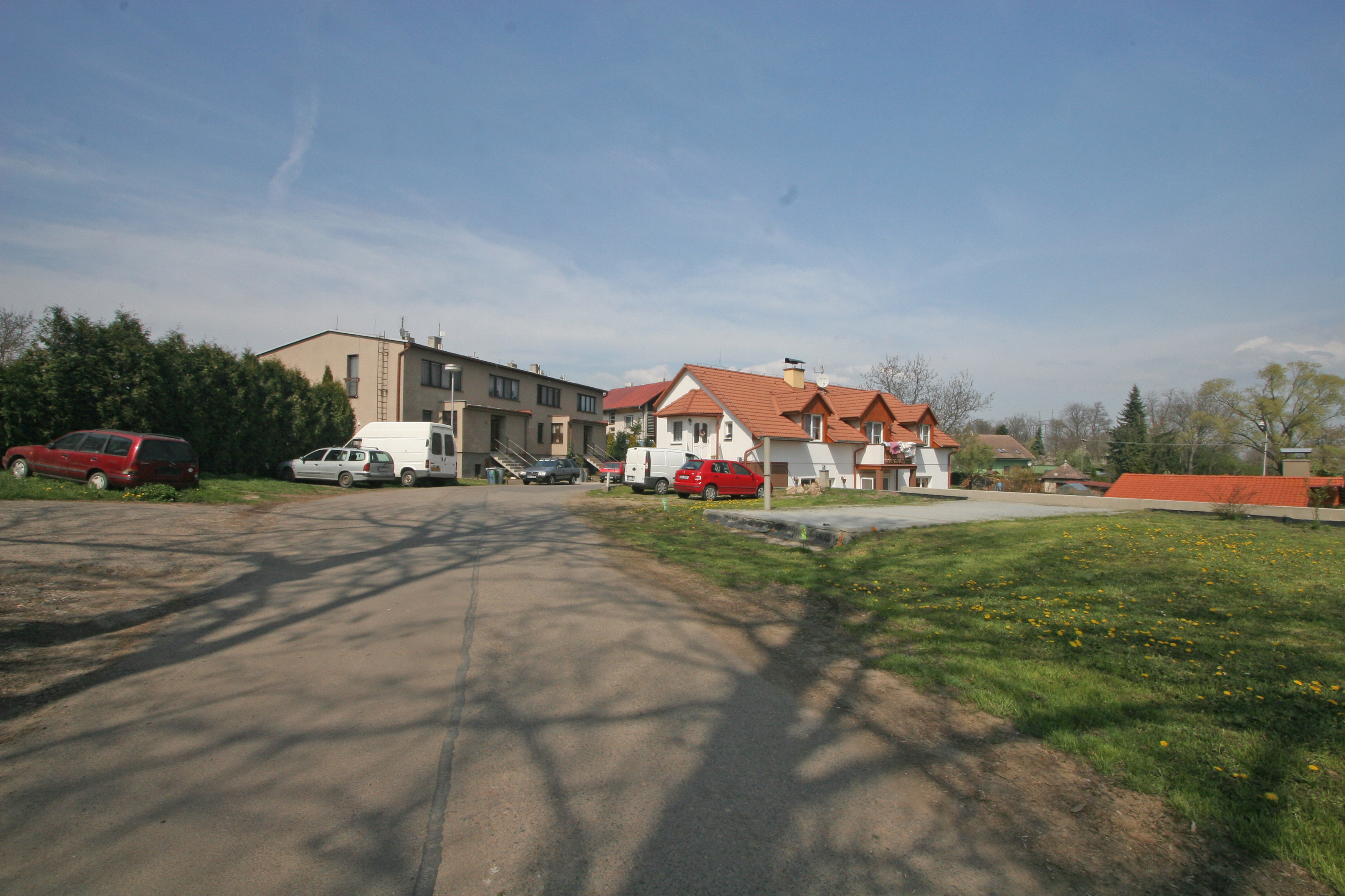 Bylany čp. 41